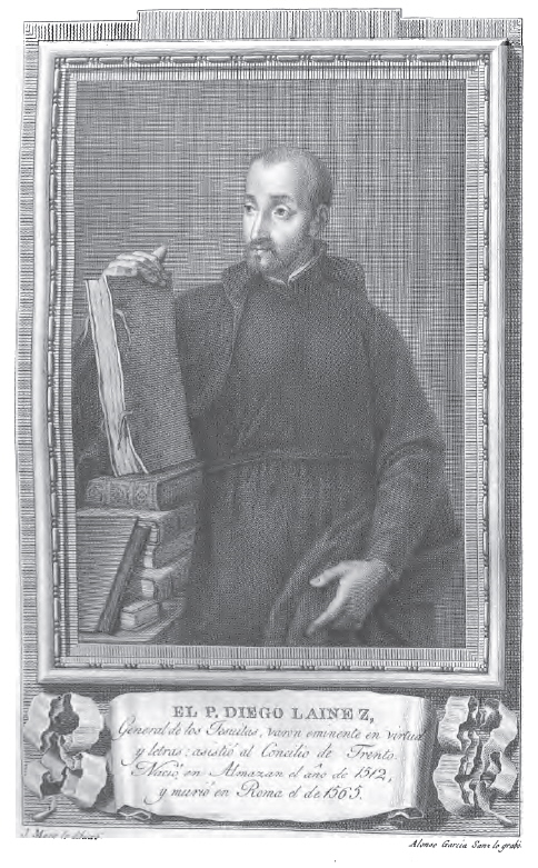 Retrato de Diego Lainez.